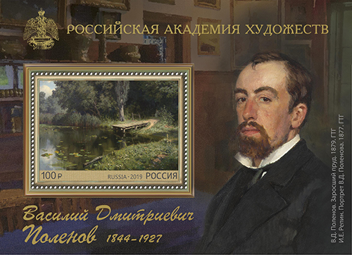 175 лет со дня рождения В. Д. Поленова (1844—1927), художника.